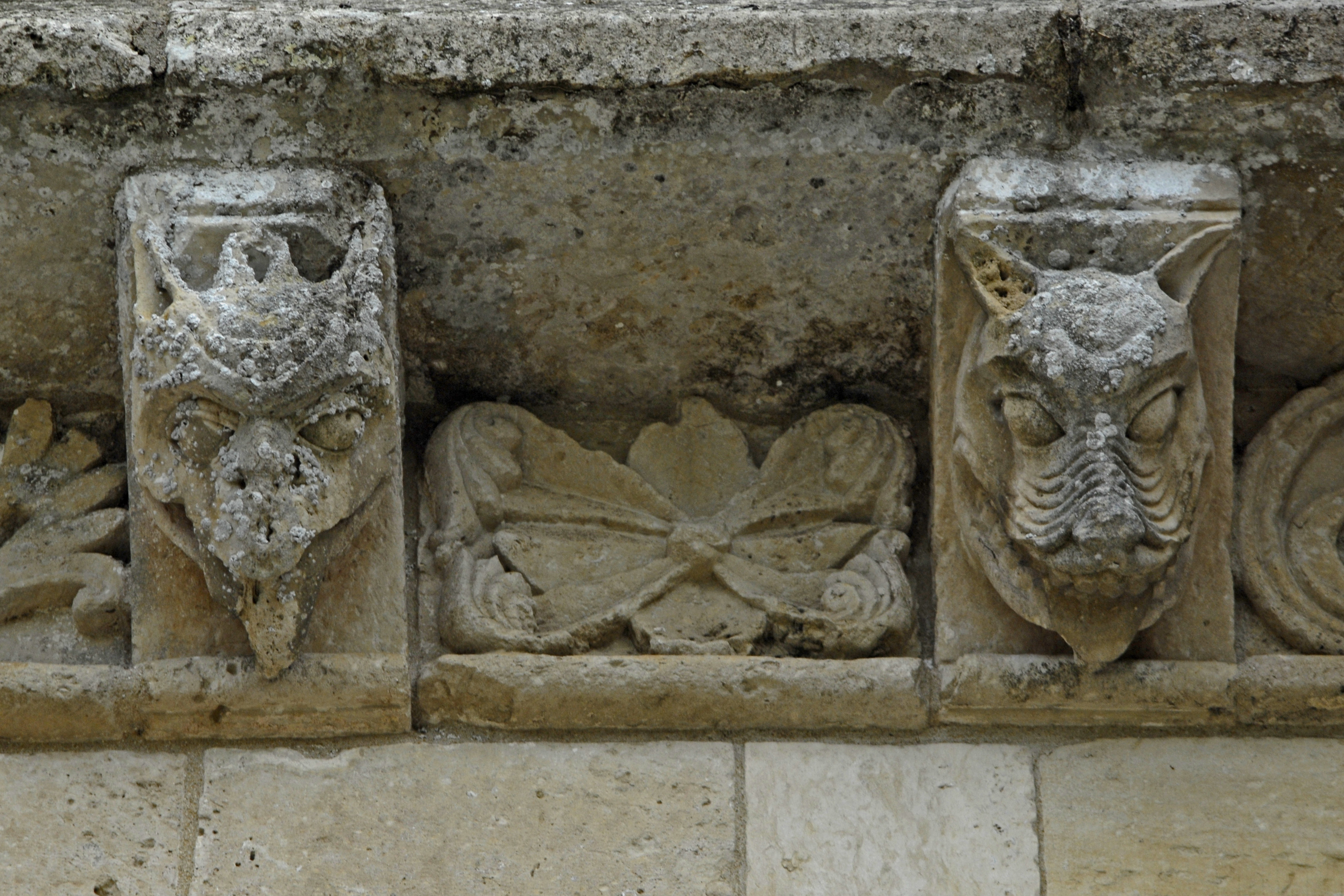 St.-Pierre Aulnay, Kragsteingesims über Hauptportal